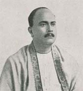 Atul Prasad Sen, Calcutta